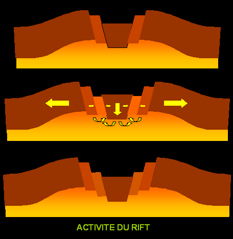 Activité du rift travail du rift mécanisme de formation des fonds océaniques fond océanique